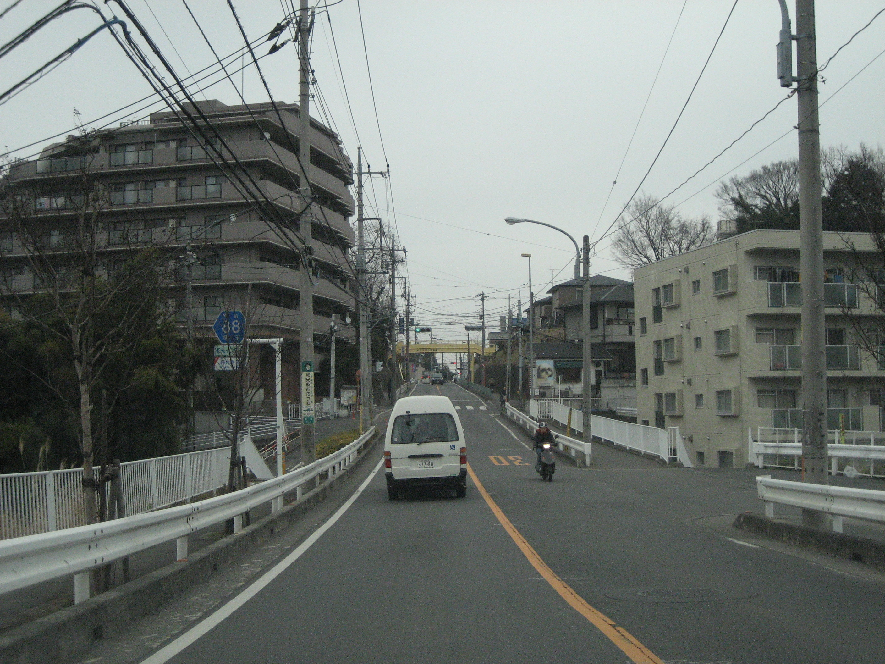 埼玉県道88号線和光市内